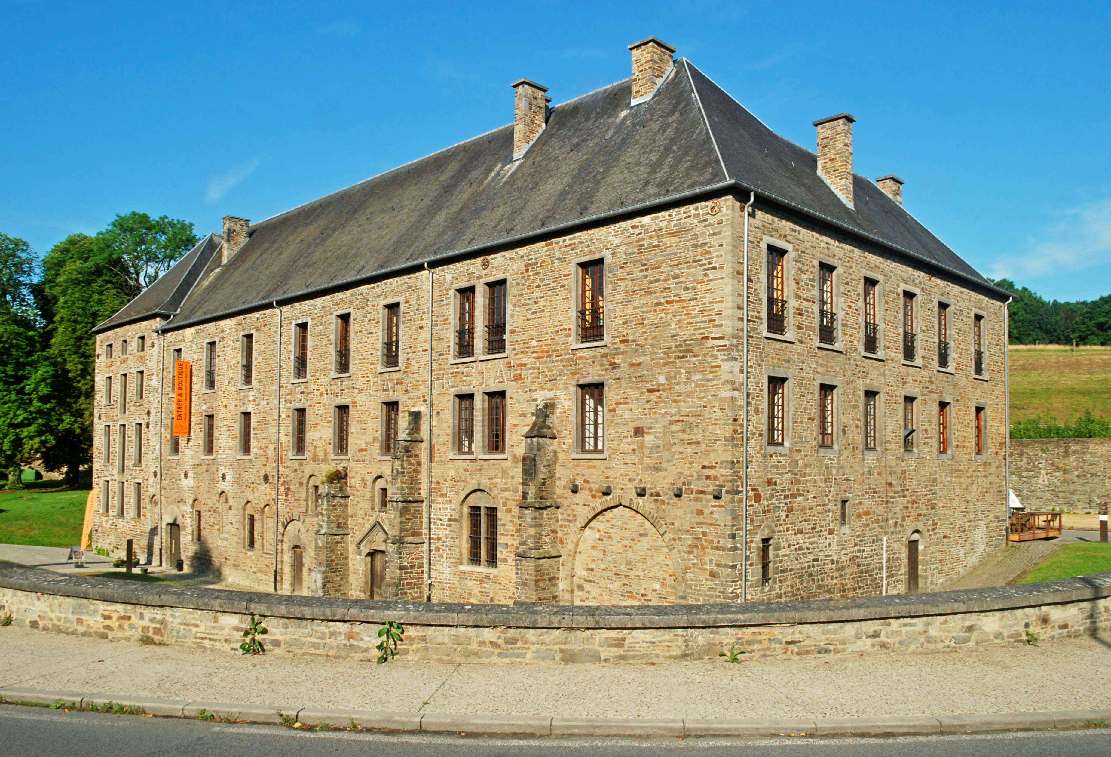 Belgique- Brabant wallon - Villers-la-Ville - ancien moulin abbatial This photo of immovable heritage has been taken in the Walloon Region